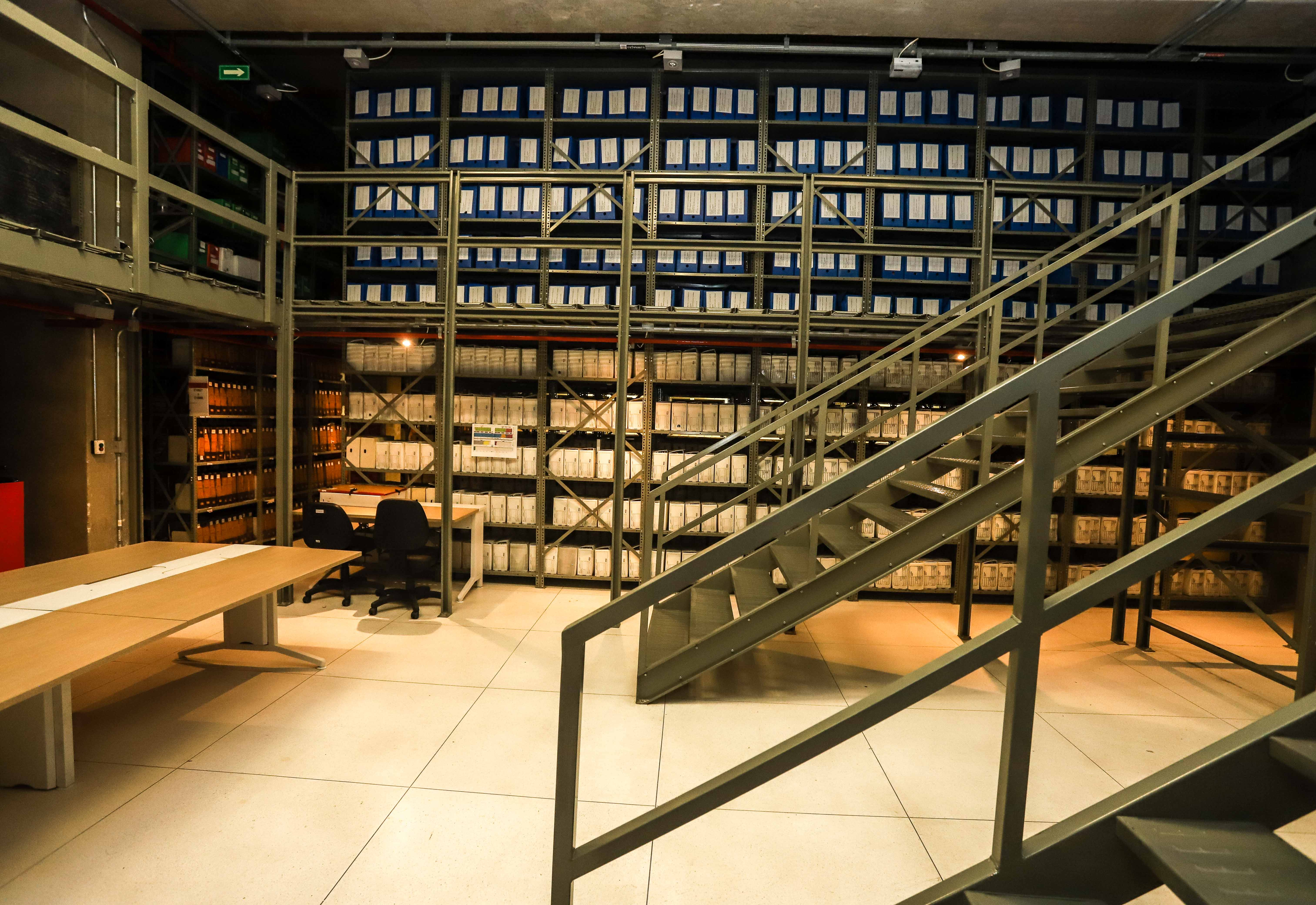 O Arquivo Público do Estado de São Paulo (APESP), criado em 1892, é um dos maiores arquivos públicos brasileiros. A instituição é responsável pelo desenvolvimento e coordenação da política estadual de arquivos por meio da gestão, preservação e acesso aos documentos públicos. Local: São Paulo/SP Data: 05/11/2018 Foto: Governo do Estado de São Paulo